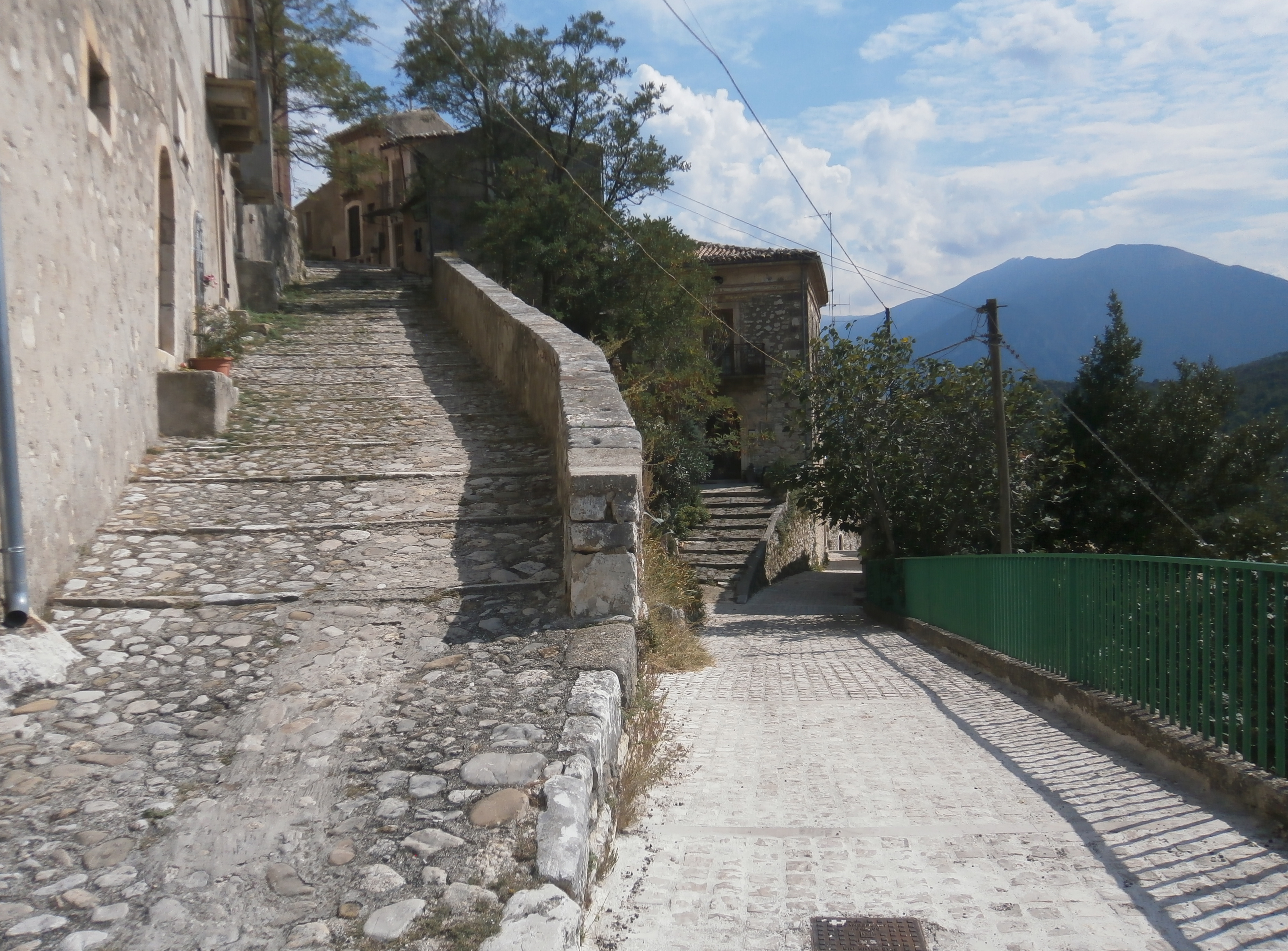 Scorci dell'antico paese abbandonato